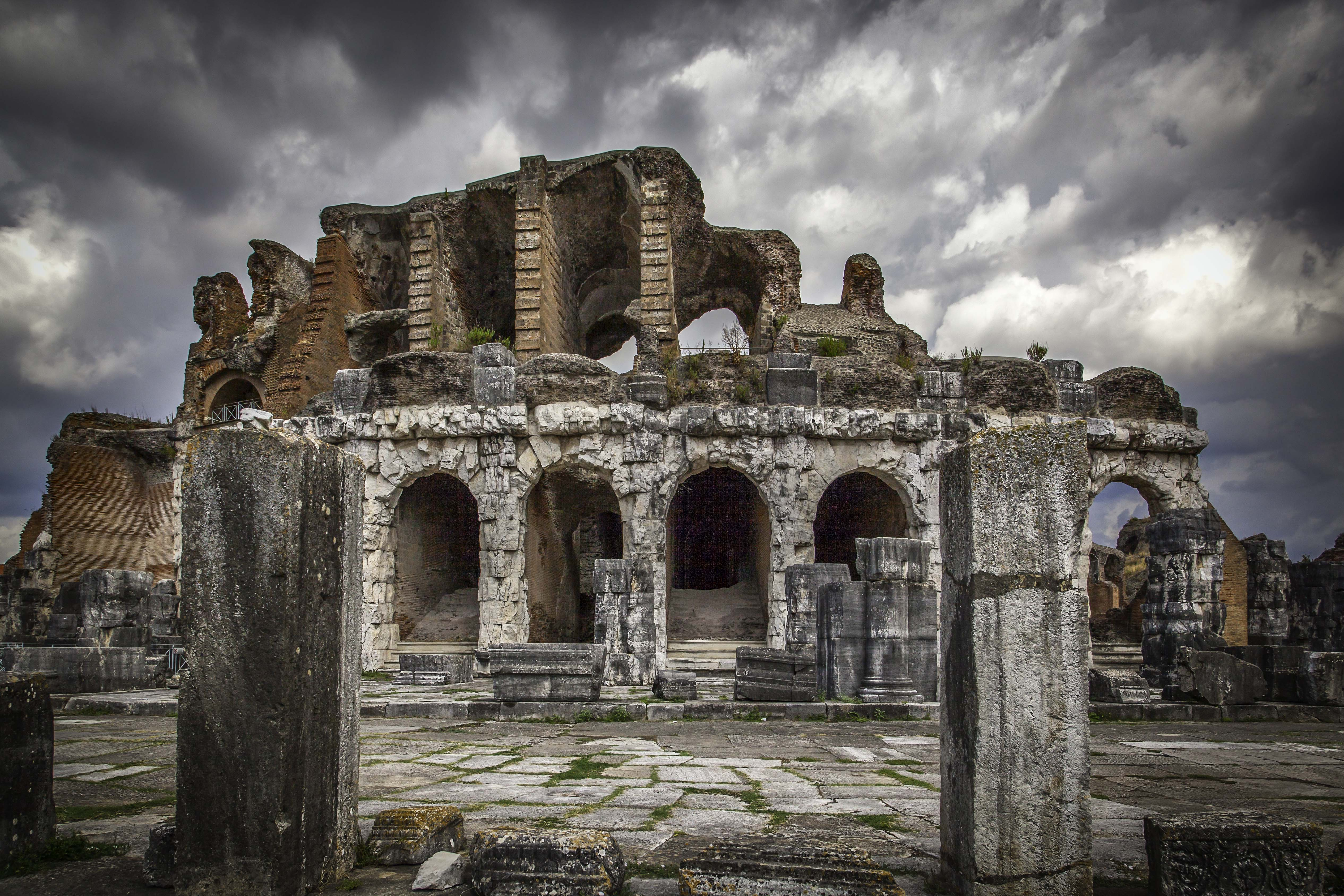 Anfiteatro Campano dell'Antica Capua This is a photo of a monument which is part of cultural heritage of Italy.